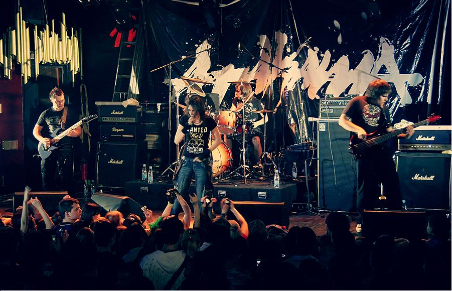 Extreme Girlzz Fest #3, Москва, Точка